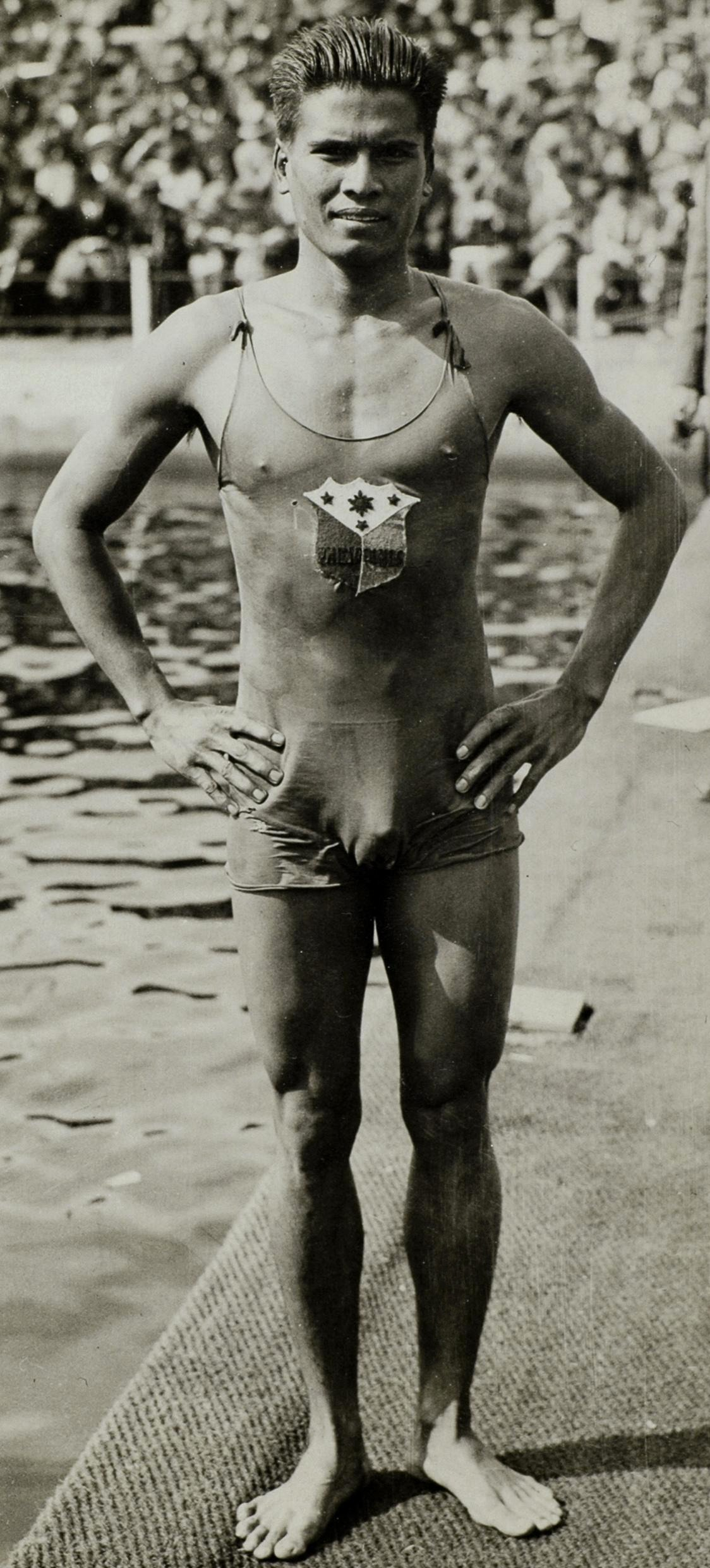 Sport. Olympische Spelen Amsterdam 1928. Zwemmen, heren : De Fillipijn Teofilo Yldefonzo, gefotografeerd nadat hij de derde plaats behaalde bij de 200 m schoolslag.